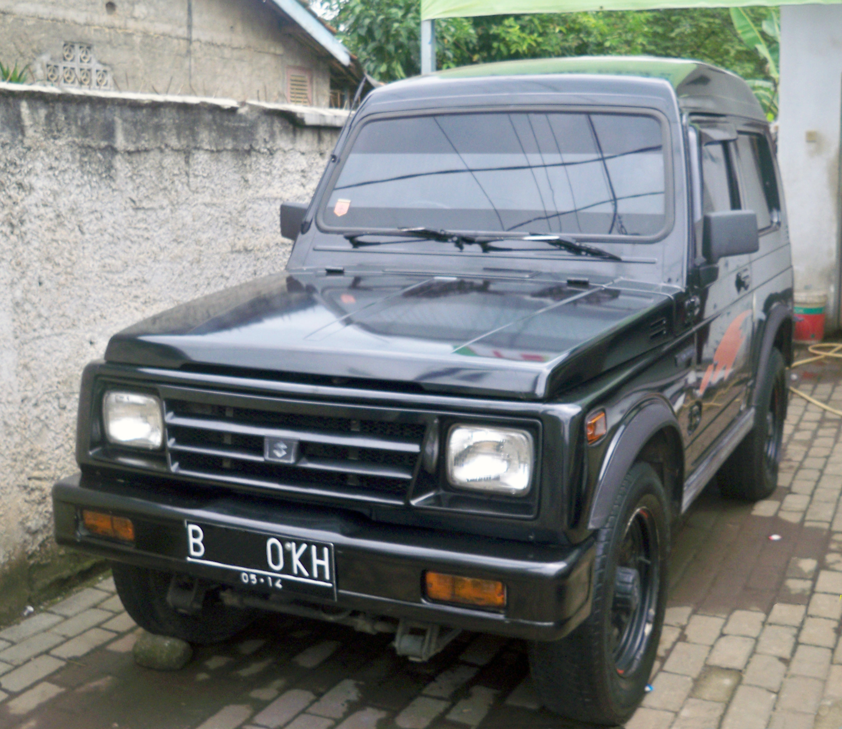 A late Indonesian-built Suzuki Katana, a Samurai with square headlights